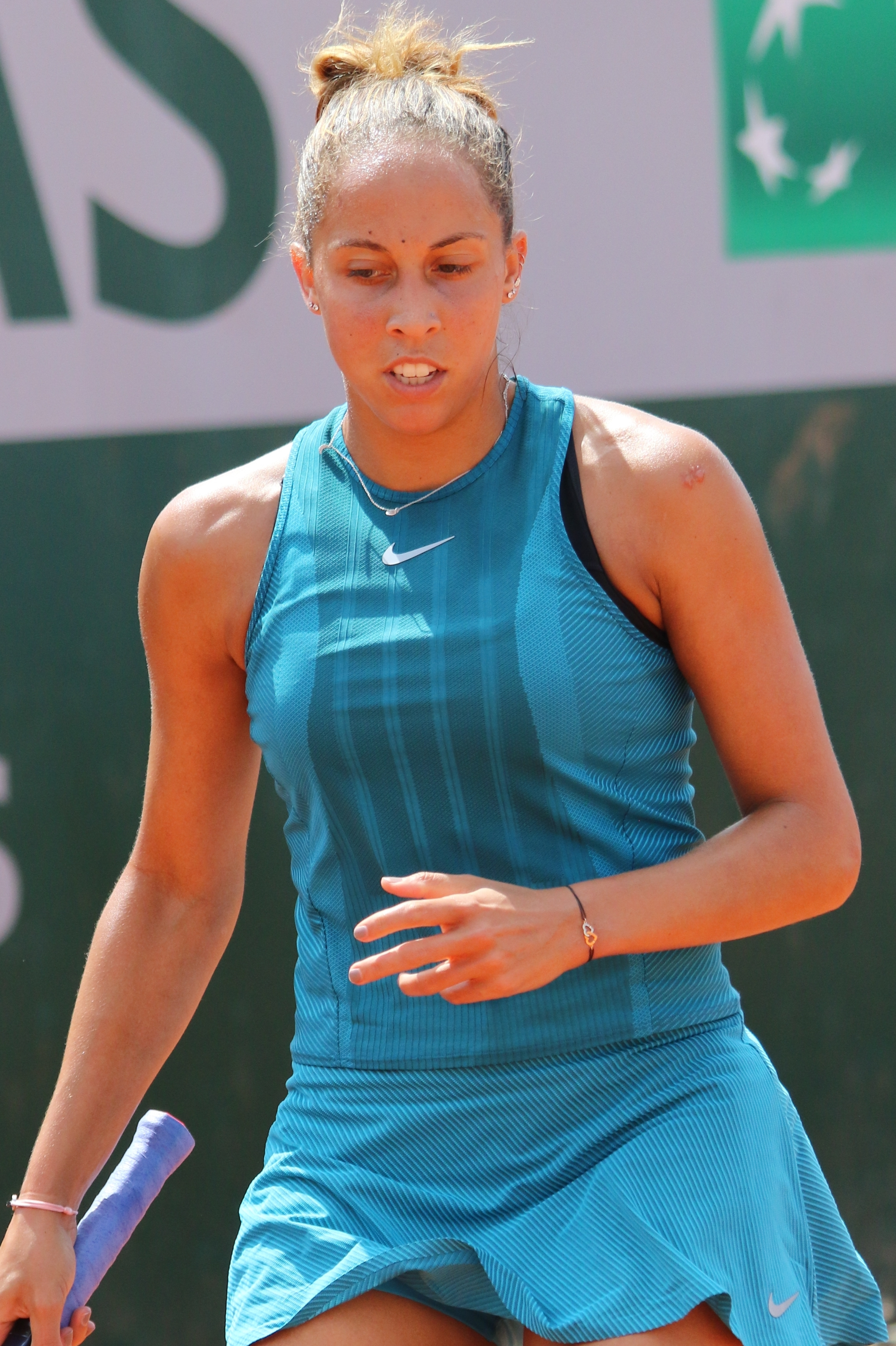 Keys RG18 (15)